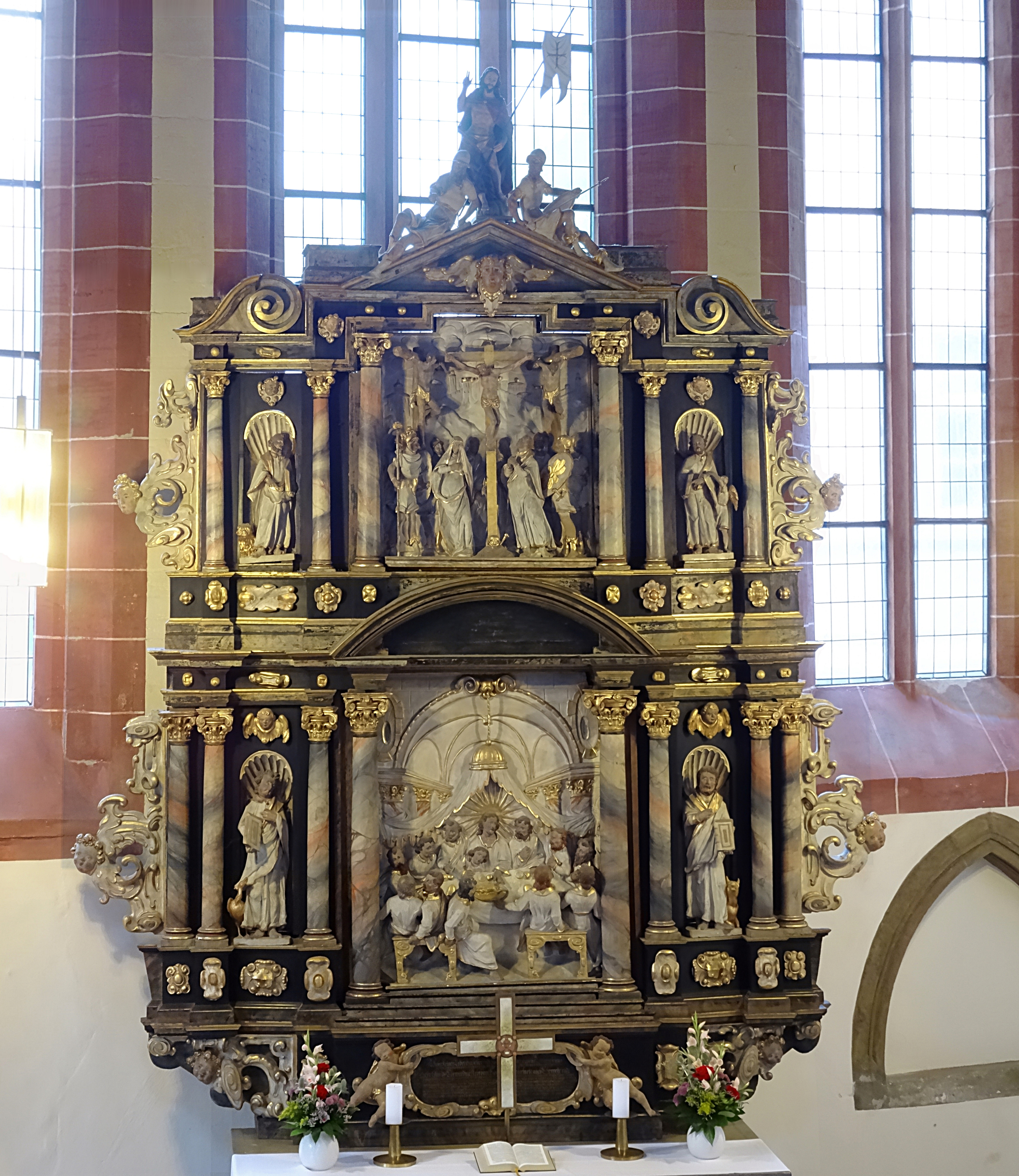 Altar der Michaeliskirche Erfurt